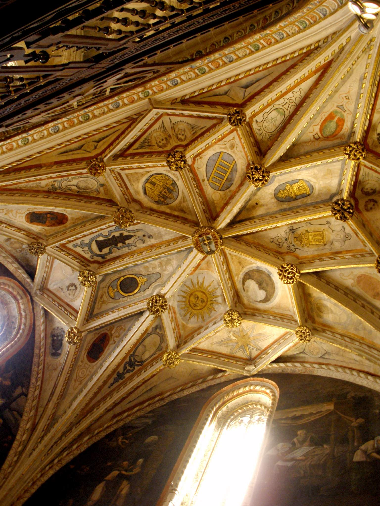 Chapel of the Concepción, Segovia Cathedral